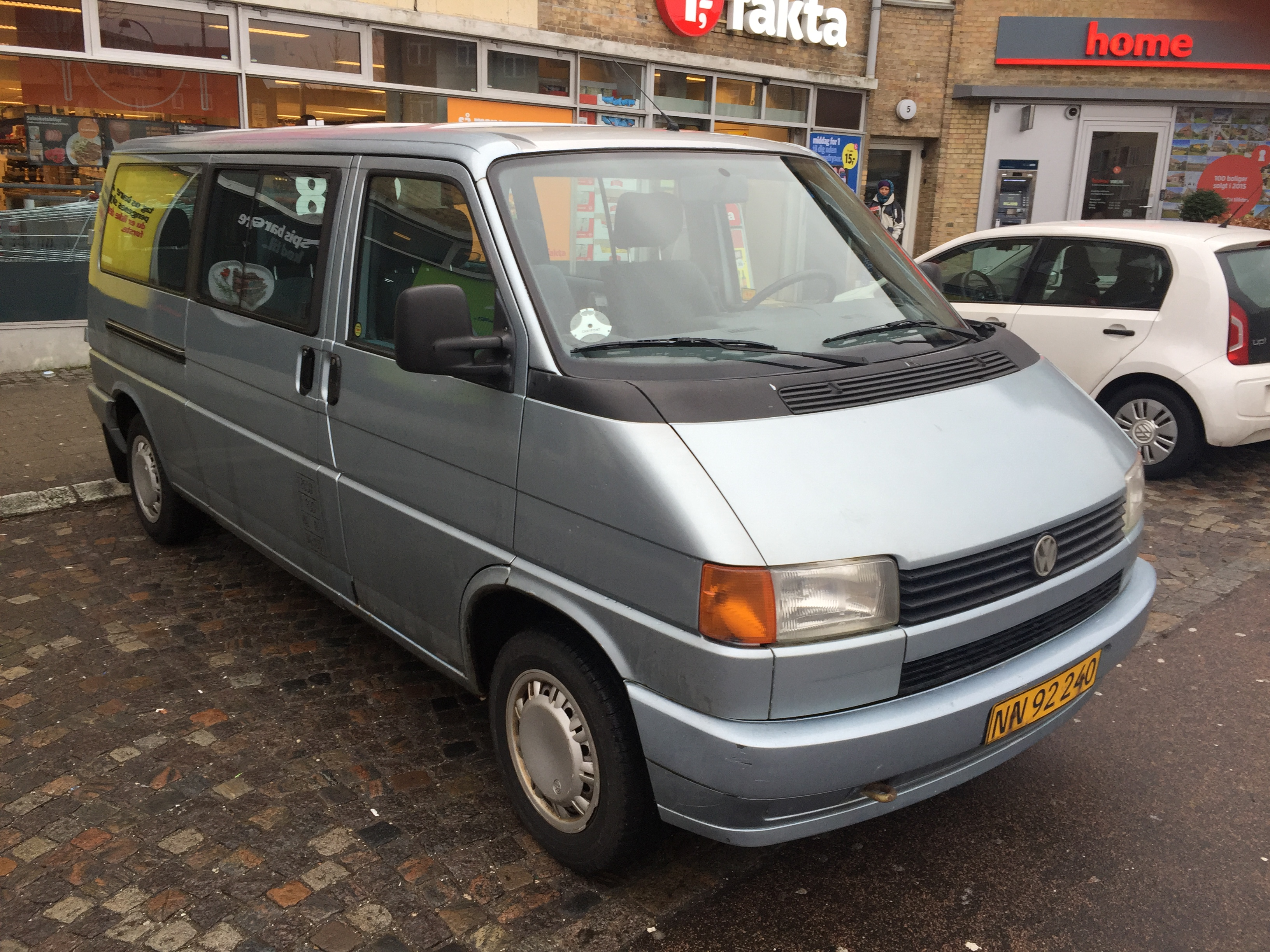 VW Caravelle årgang 1993